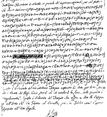 Lettera cifrata creata da Raimondo di Sangro